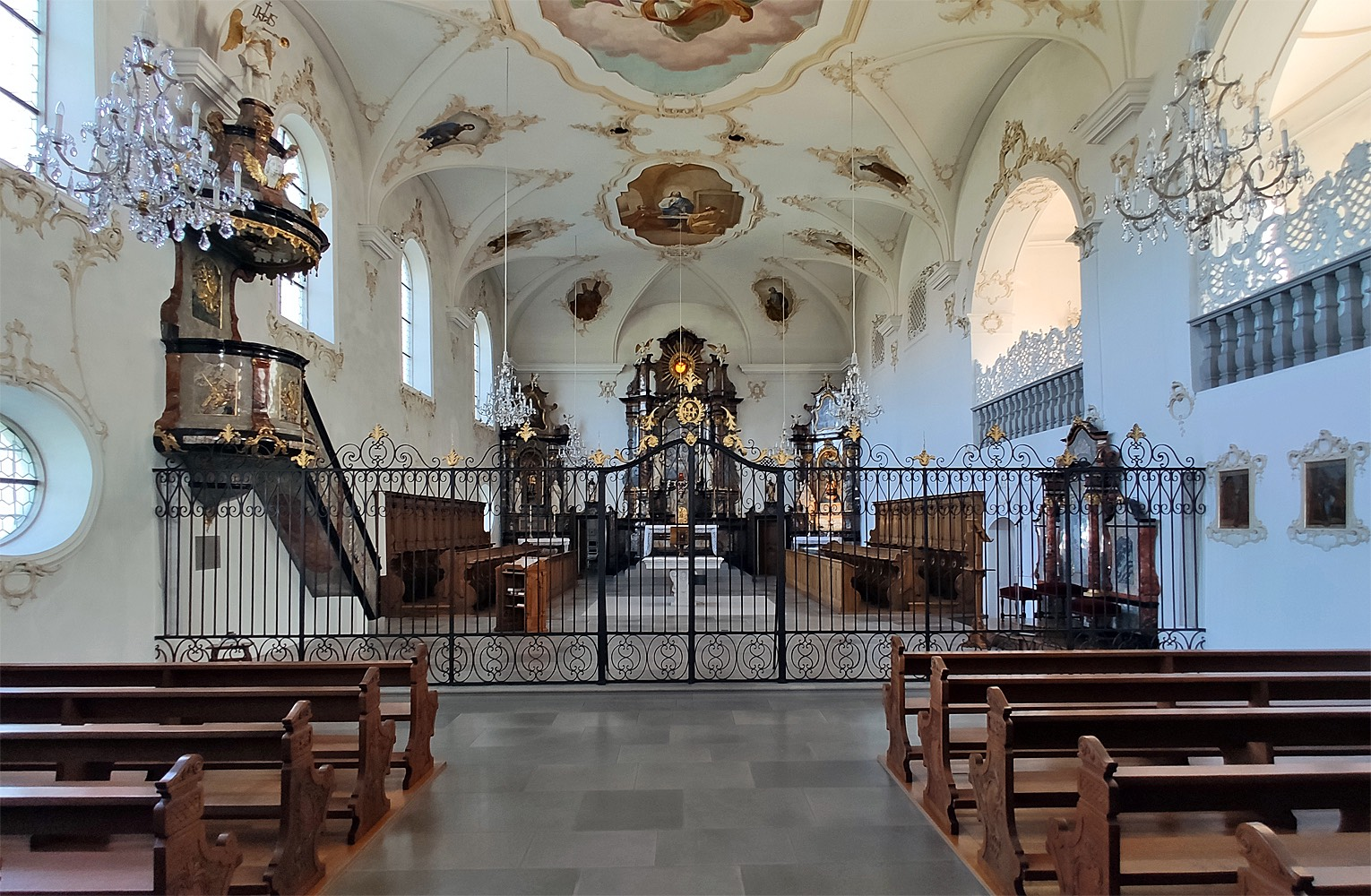 Klosterkirche der Zisterzienserinnen-Abtei Frauenthal in Hagendorn bei Cham, Kanton Zug